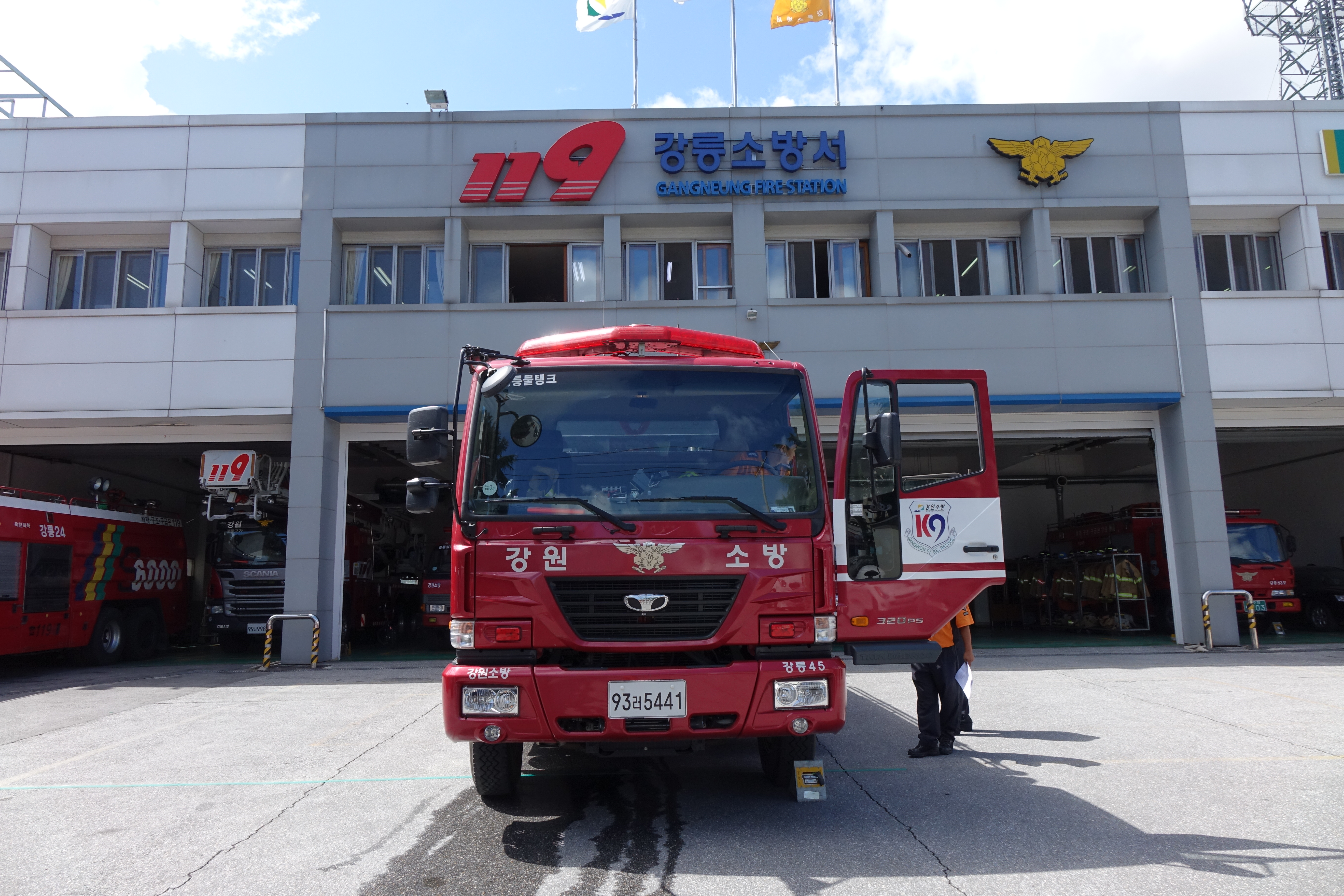 강릉소방서 물탱크차